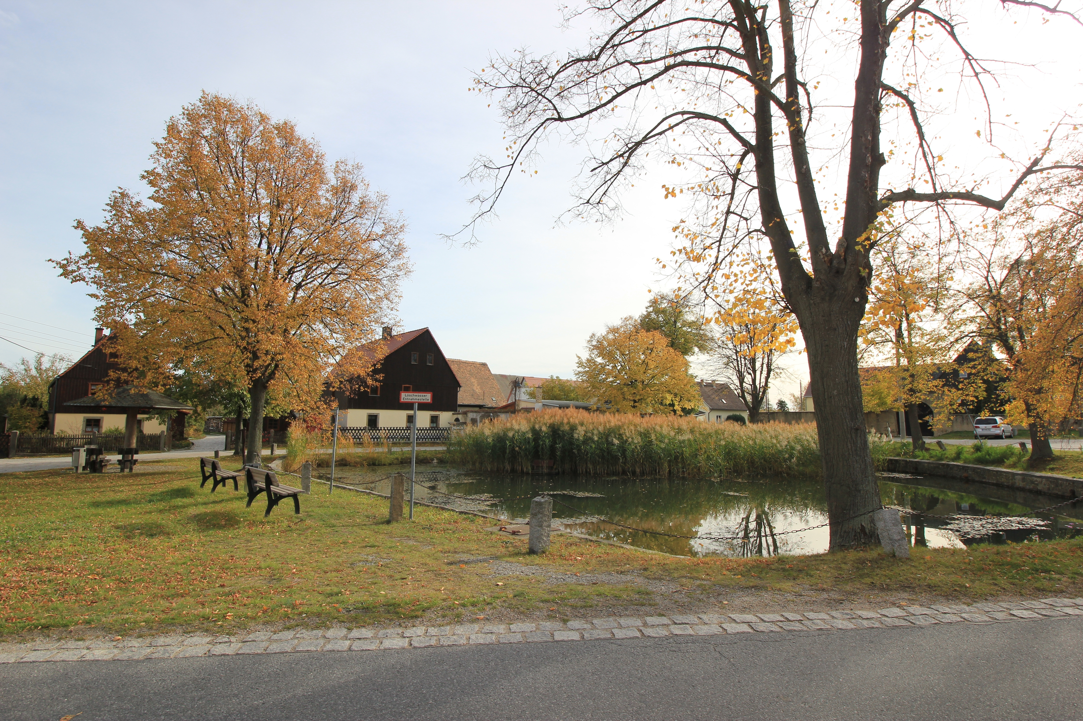 Hornjoserbsce: Zajdow; wjesny hat na nawsy.